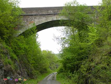 eigen werk vrij bij vermelding naam en bron